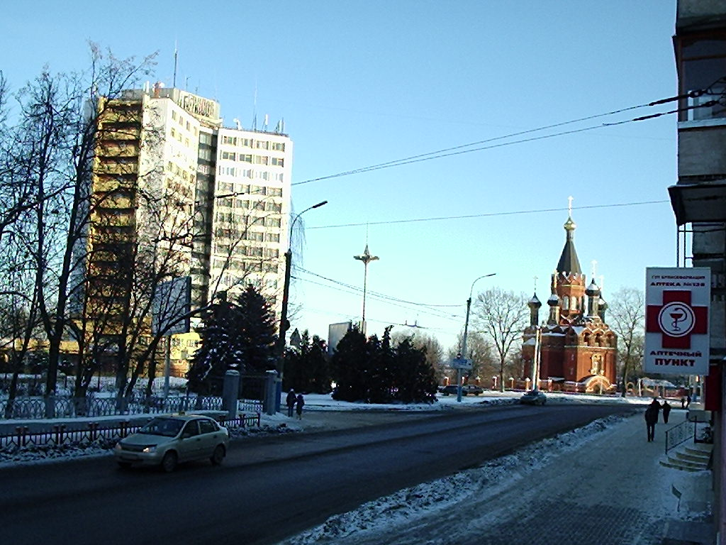 Bryansk, Russia